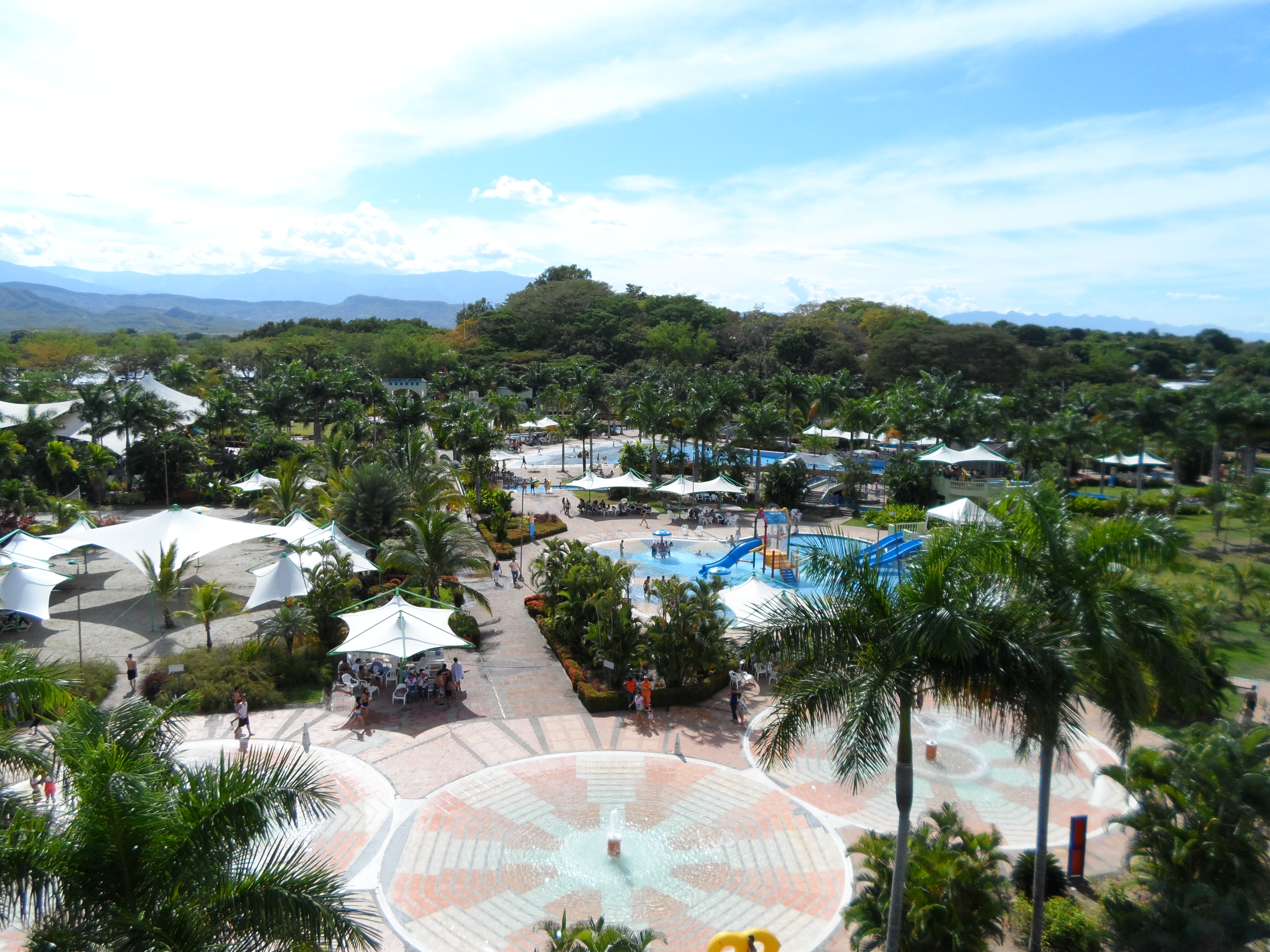 Centro Recreacional Playa Juncal, Juncal - Huila